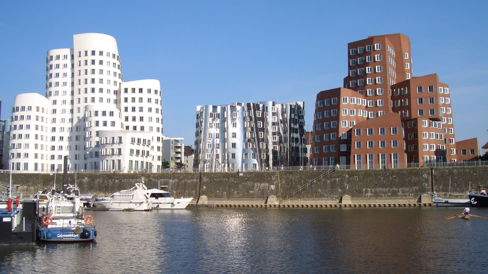 Buildings by Frank Gehry in Düsseldorf